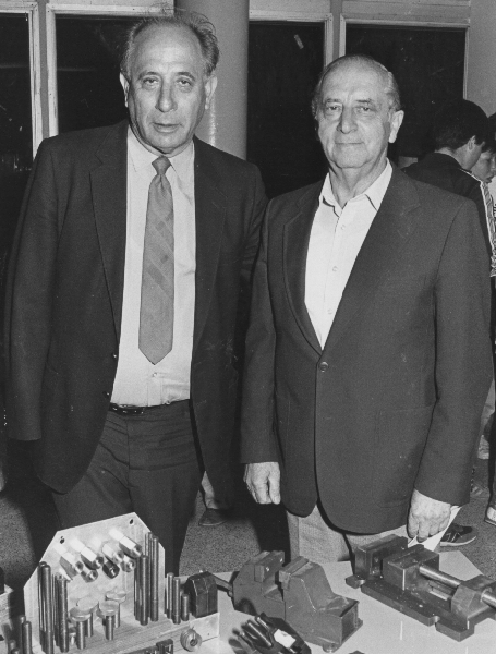 ישראל גורלניק (משמאל) עם מאיר אביגד, מנהל המחלקה לחינוך מקצועי במשרד החינוך, בסדנא מכנית בבית ספר של אורט (1985)